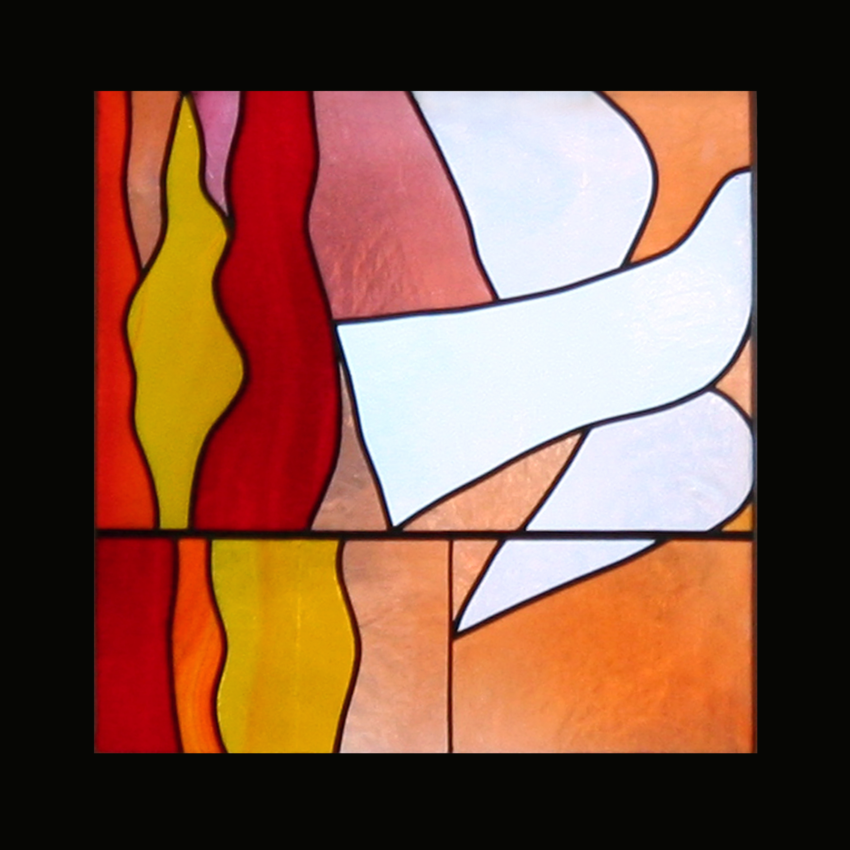 Kloster Ilanz, Klosterkirche, Glasfenster von Max Rüedi